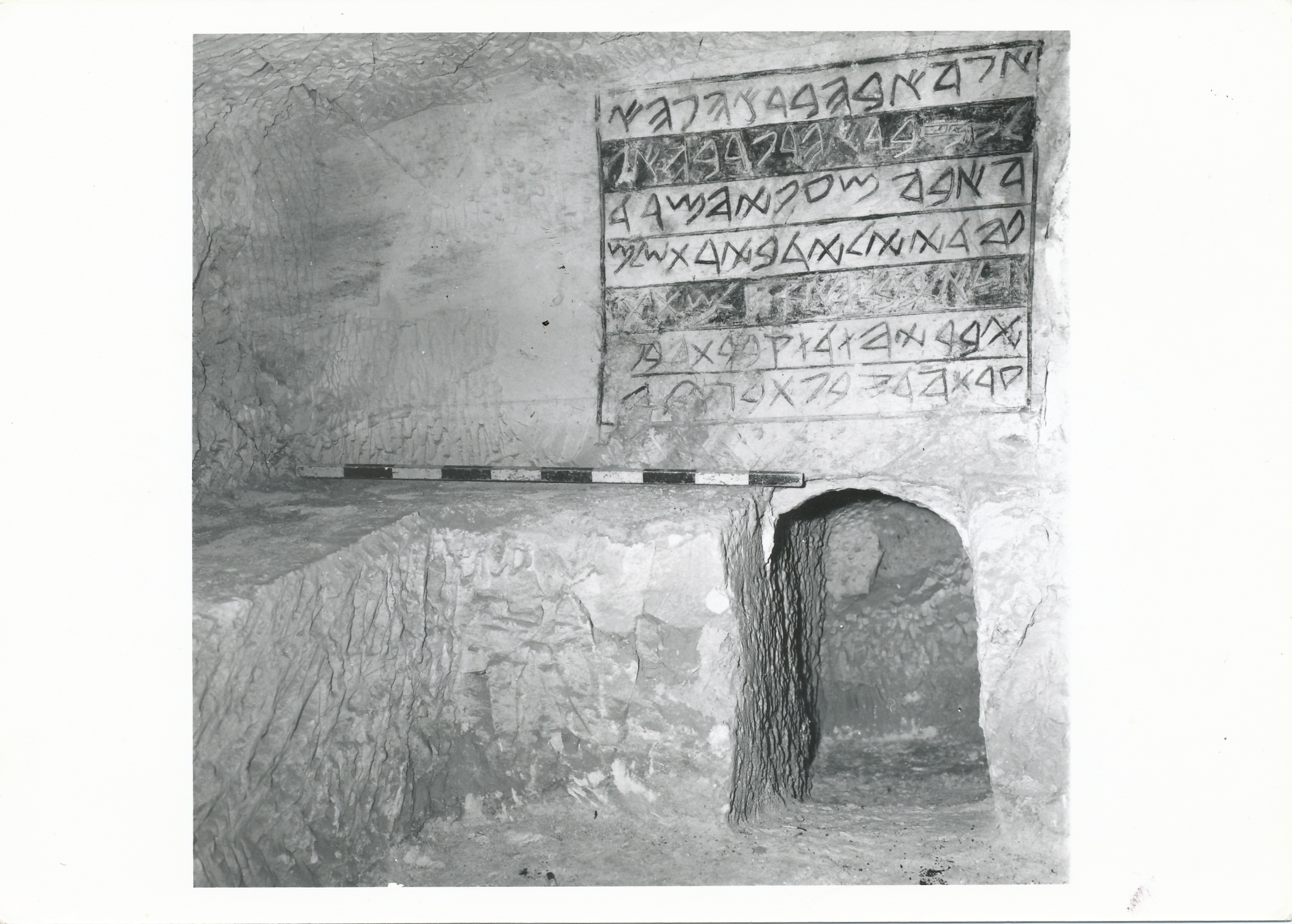 חדר מס' 2 במערת בית אבה כפי שנמצאה בשנת 1970 עם הכתובת על הקיר